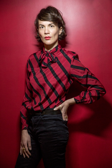 Marie-Ève Lacasse par Claude Gassian